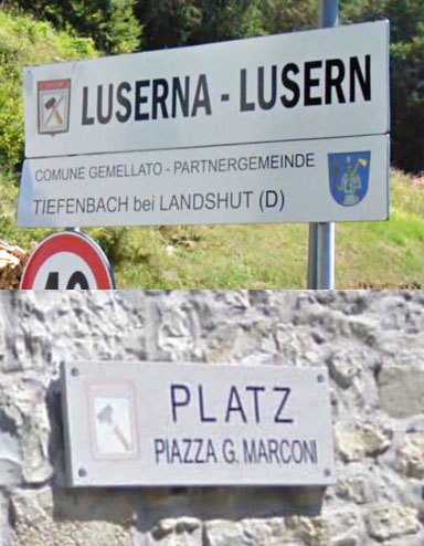 Gemeinde Lusern/Luserna, Autonome Provinz Trient, Italien. Oben: Zweisprachiges Ortseingangsschild; Unten: Beispiel für ein neues Straßenschild (oben der deutsche Name, unten kleiner der italienische Name)